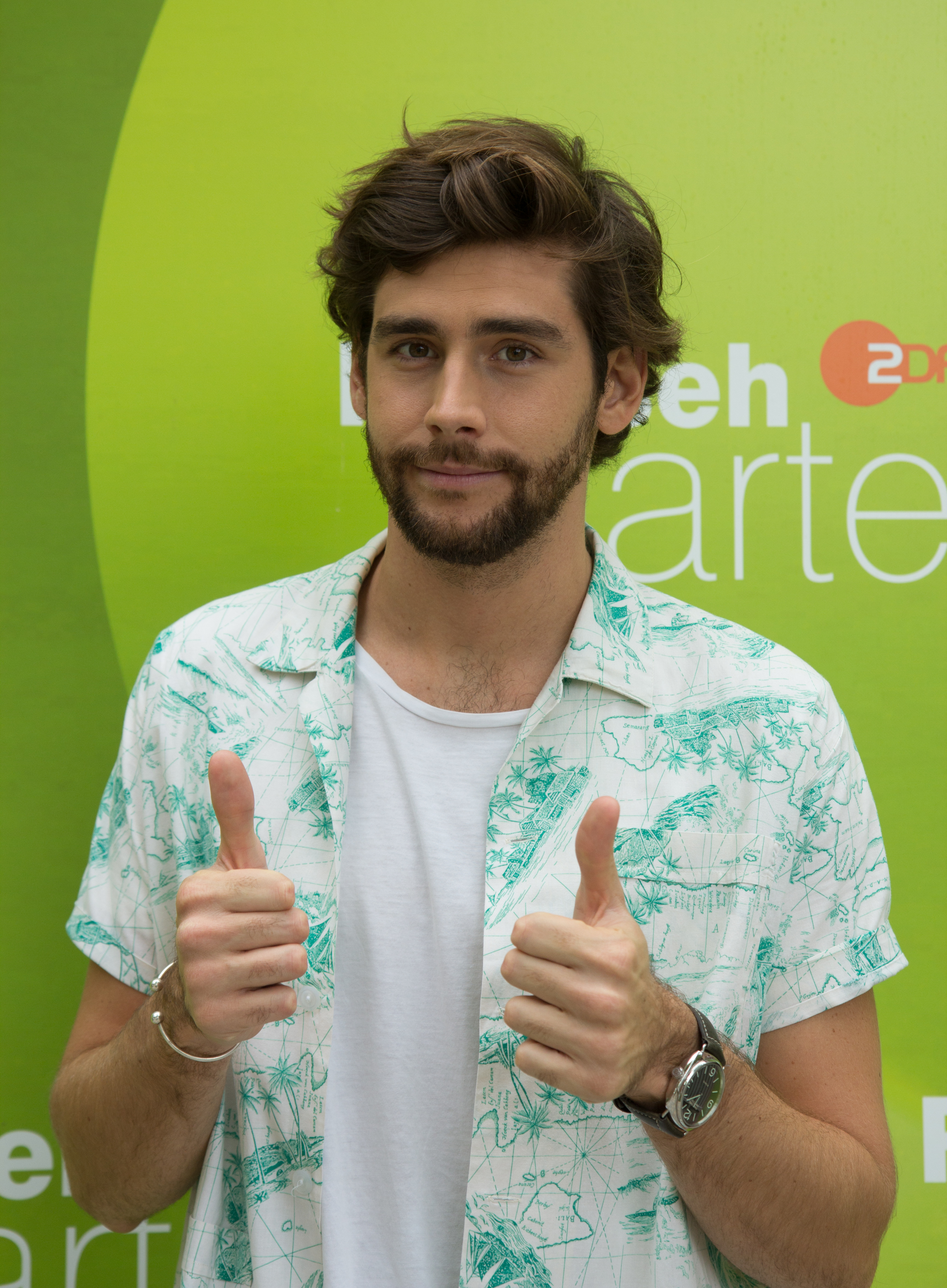 Alvaro Soler als Gast im ZDF-Fernsehgarten am 2. September 2018 in Mainz.